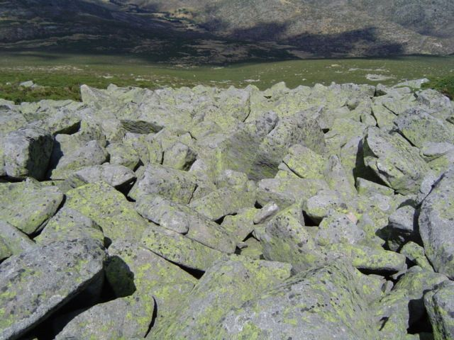 Pedrera en La Serrota (Ávila) España